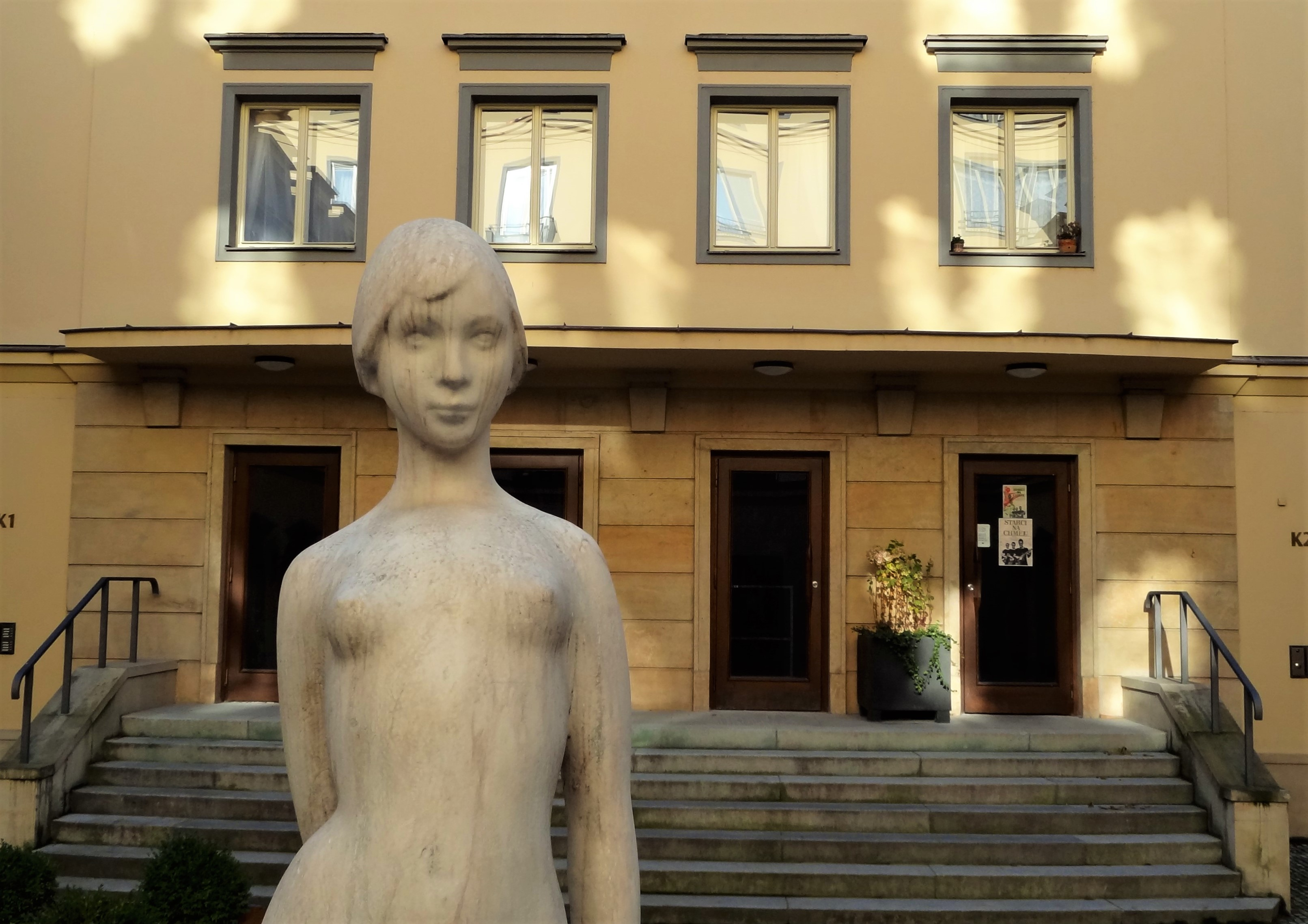 Kino 64 U Hradeb